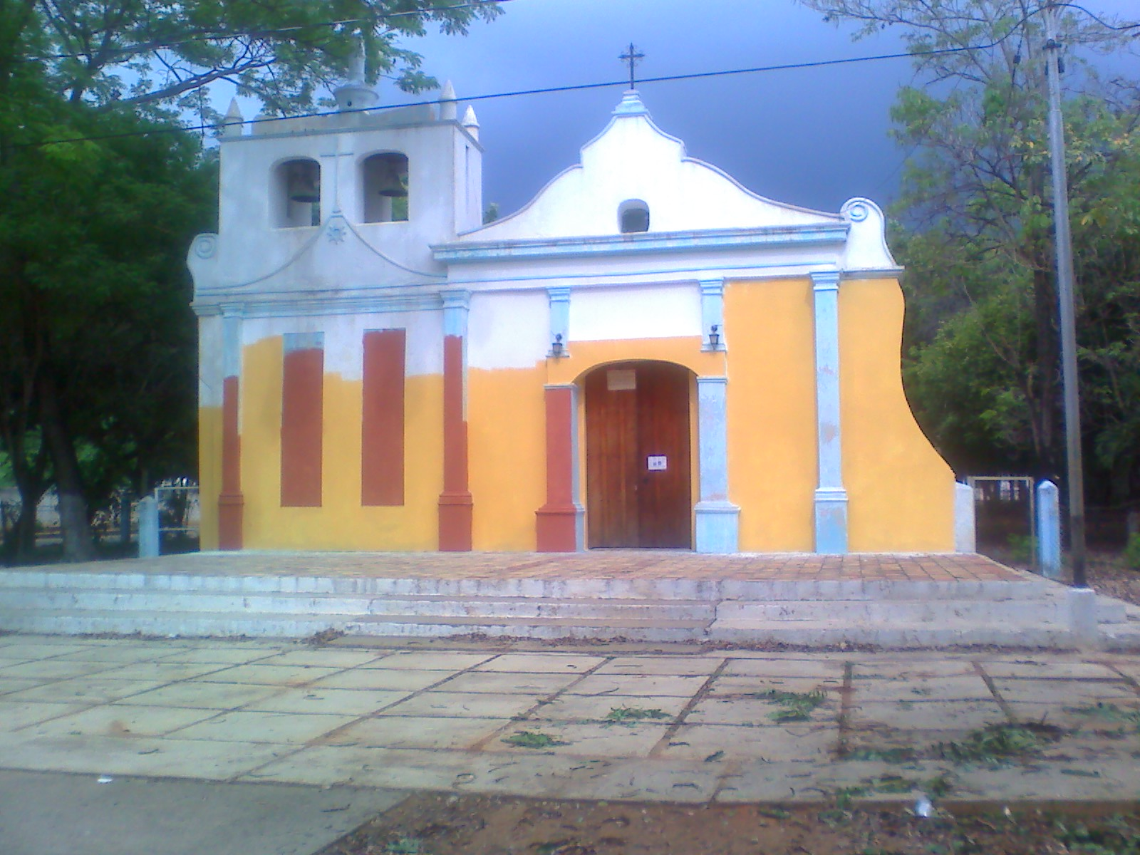 capilla san antonio en la Curarigua (capital de la Parroquia Antonio Díaz)